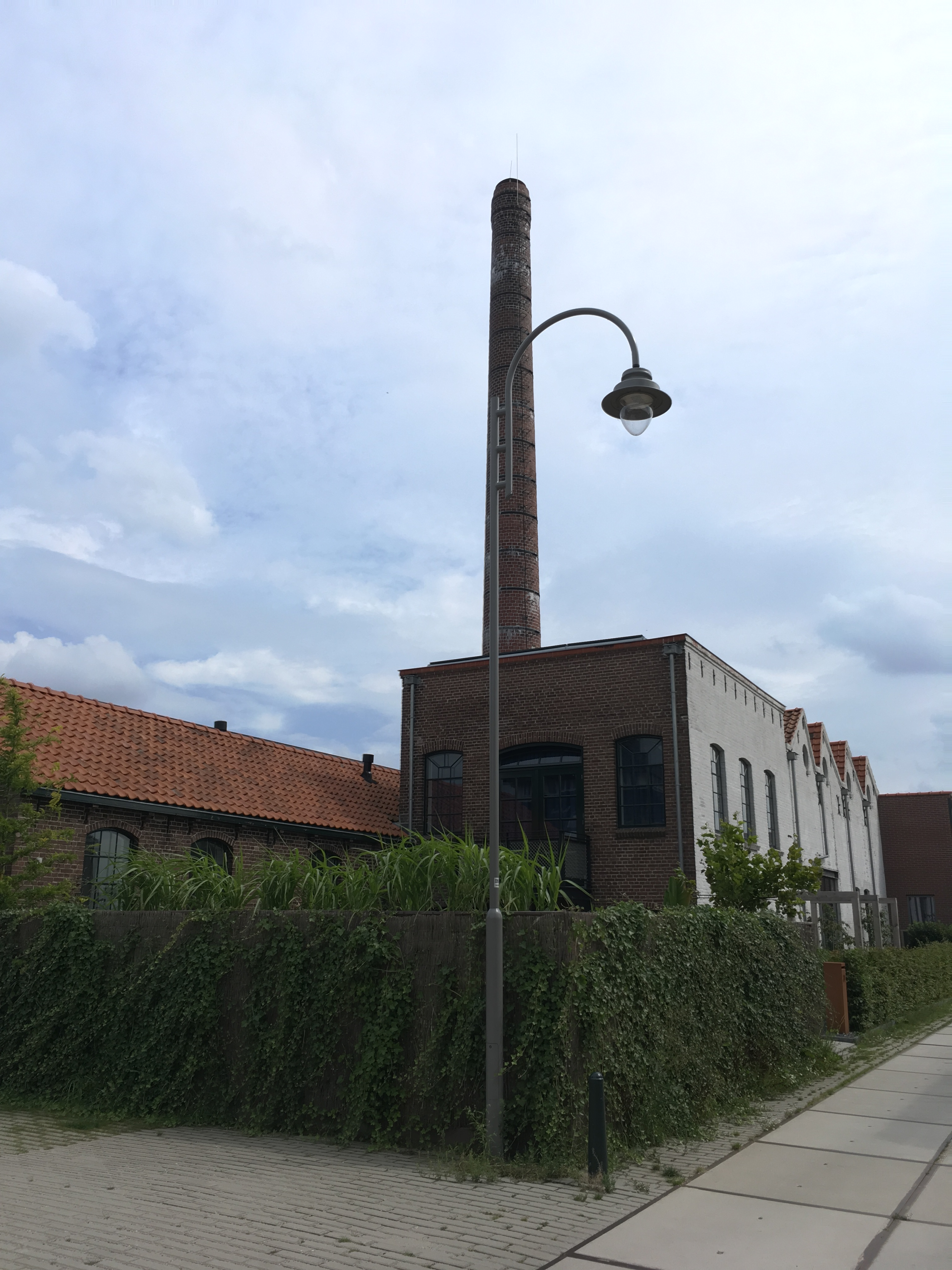 Ketelhuis en schoorsteen Touwfabriek G. van der Lee, in het gerenoveerde woongemeente van de touwfabriek in OUdewater.